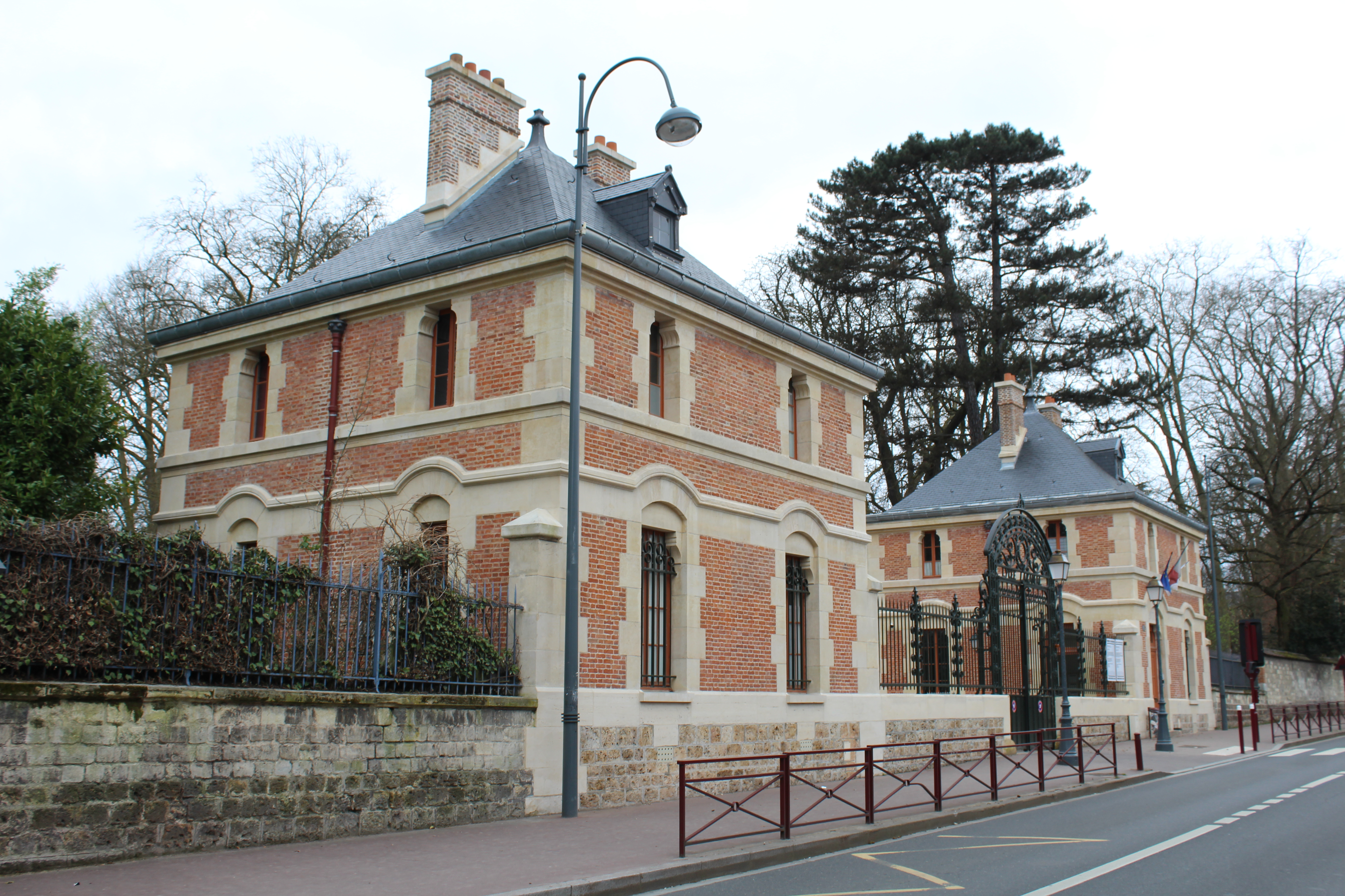 Écuries du parc de Sceaux.